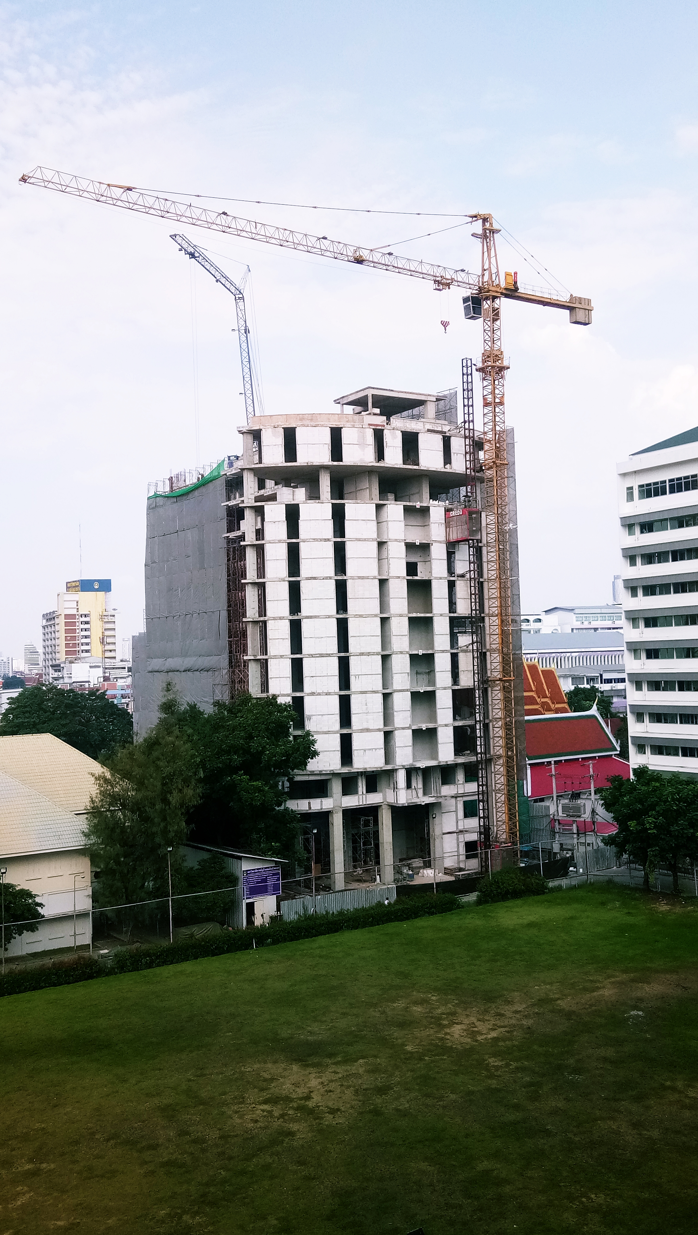 ตึกคณะวิศวกรรมศาสตร์เเละเทคโนโลยีอุตสาหรรม